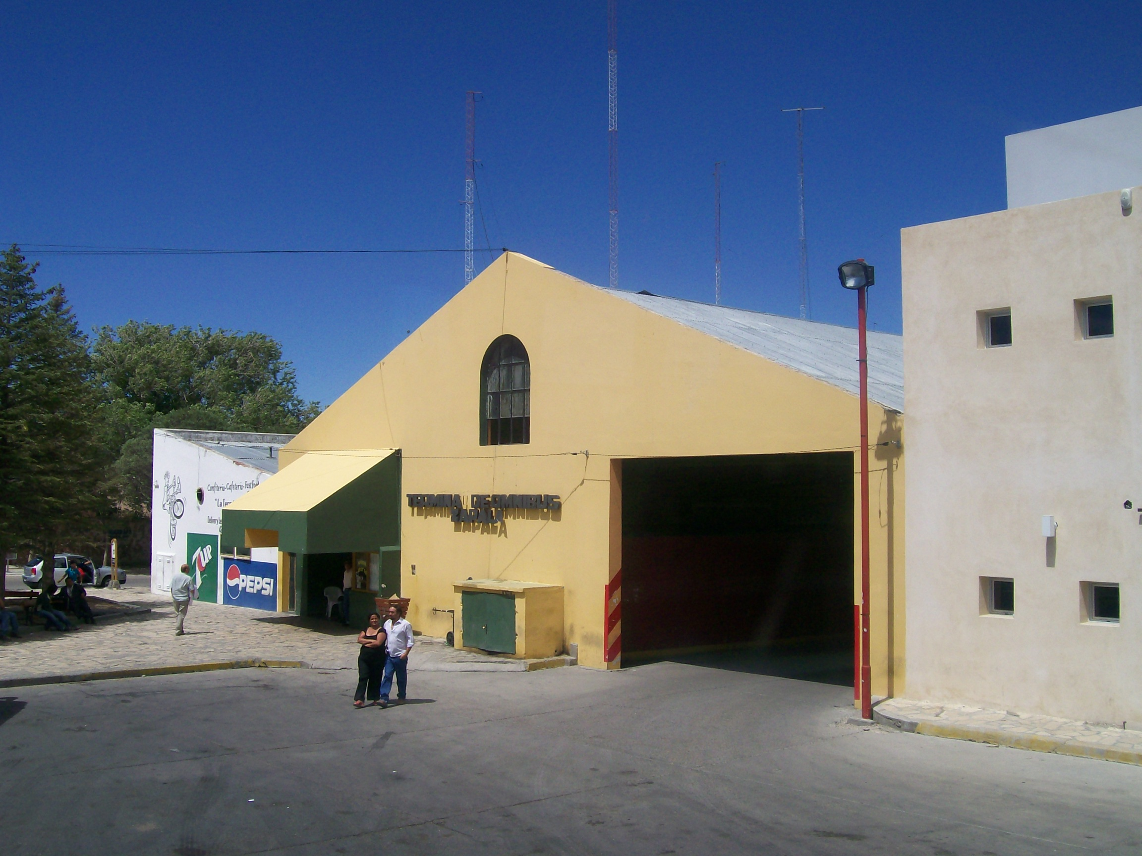 Terminal de Zapala, Neuquén.